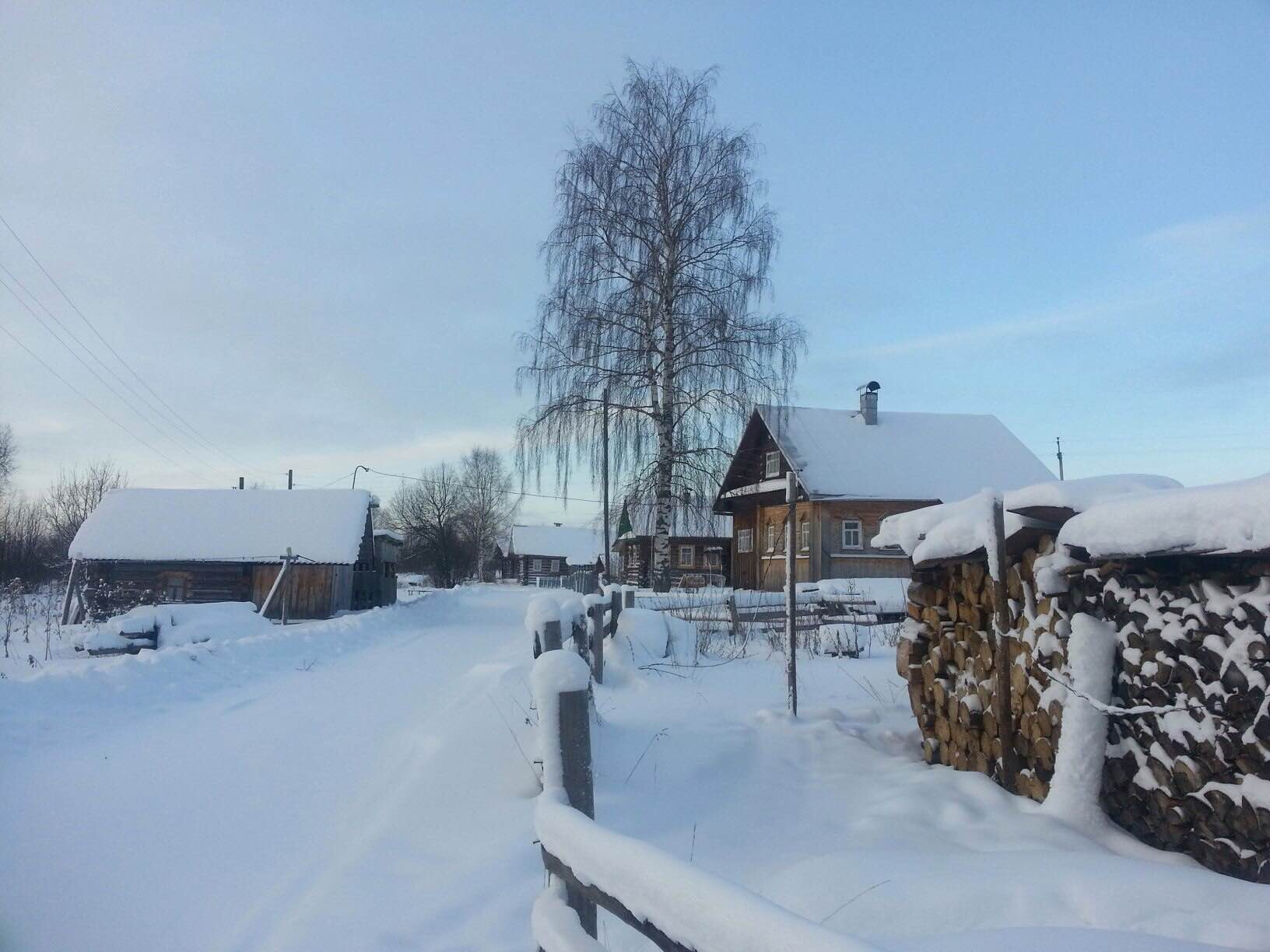 Морозный день перед Рождеством